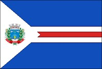 Bandeira da cidade de Ibirá, SP, estabelecida pela Lei Municipal Nº: 532 de 27 de fevereiro de 1976 (